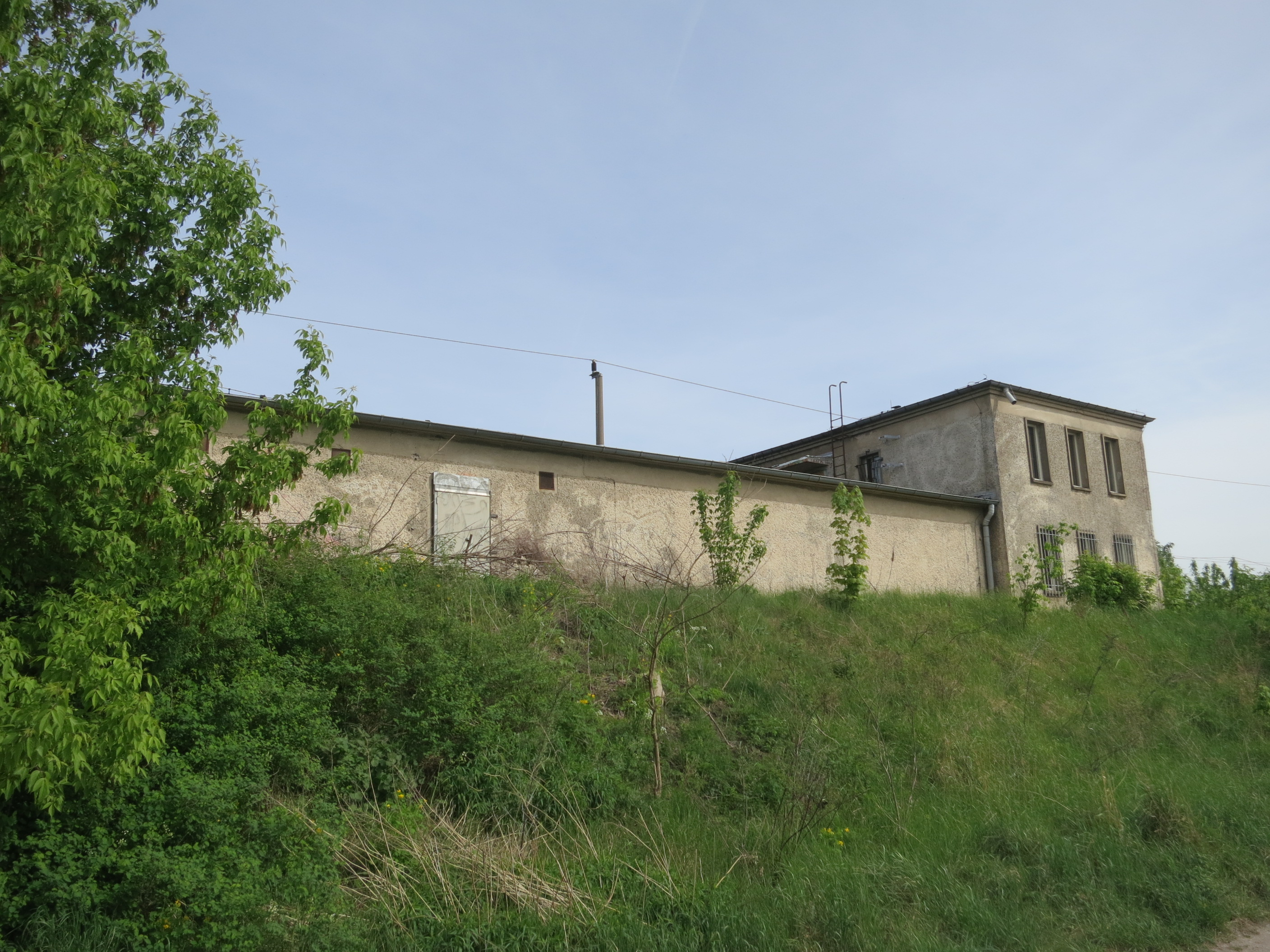 Früherer Bahnhof Fichtengrund, denkmalgeschütztes Stellwerk (Straßenseite)